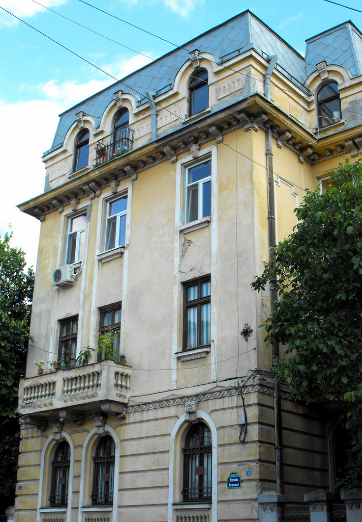 Icoanei 58